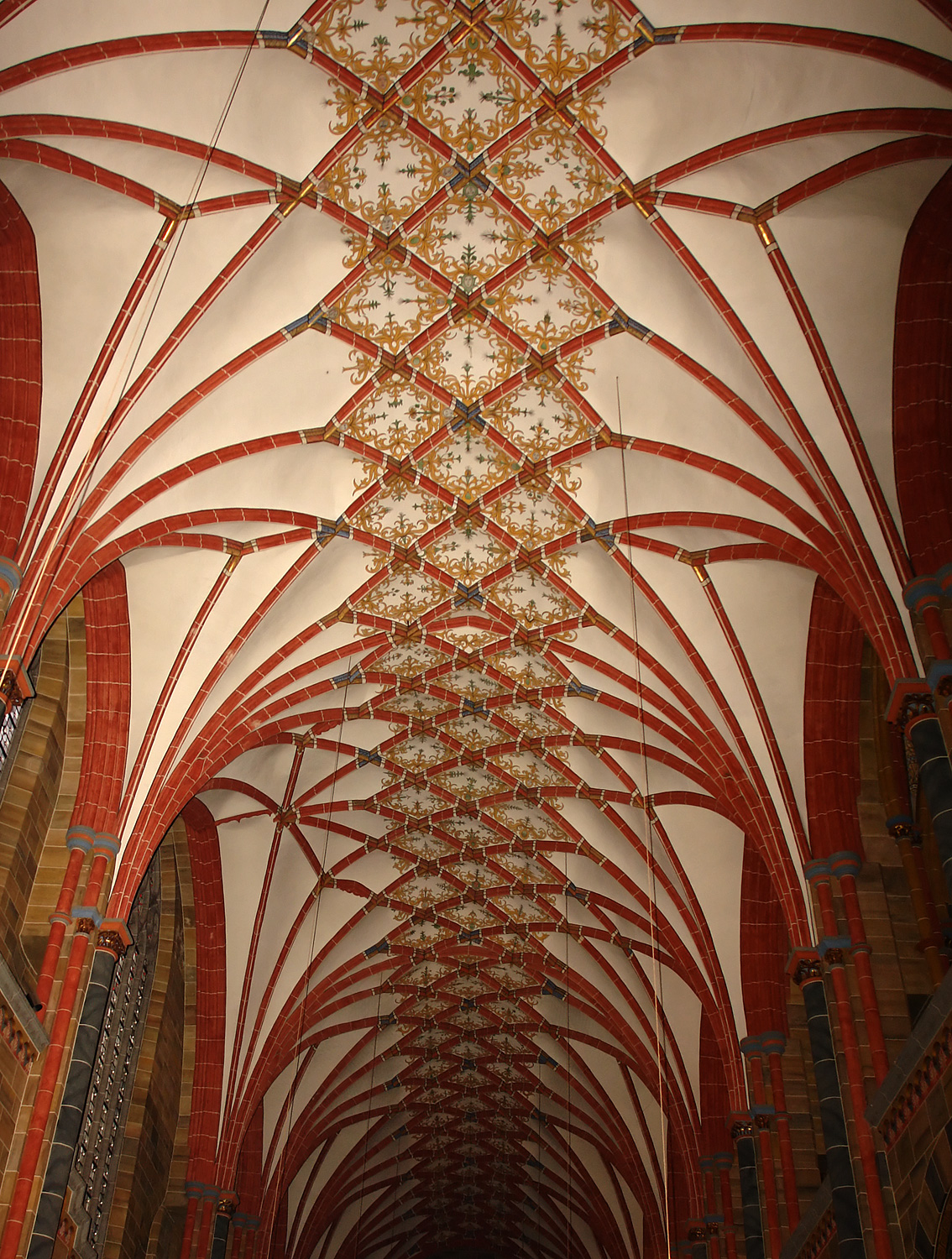 Bremer St. Petri Dom: Netzgewölbe (Mitte 16. Jh.) im nördlichen Seitenschiff (Richtung Ost)